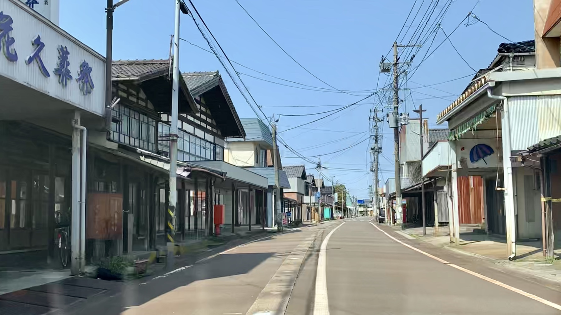 曽根（新潟市西蒲区）のまちなみ（2020年3月）新潟県道374号五千石巻新潟線